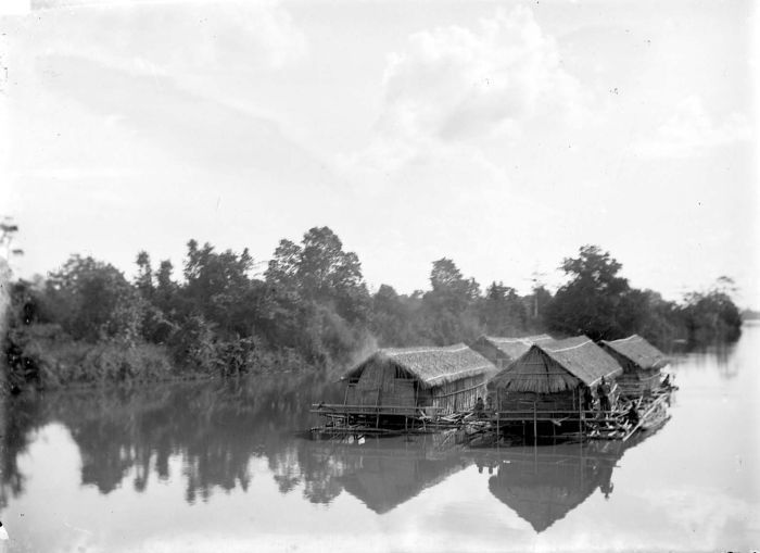 Negatief. Houtvlotten met woningen erop, die de rivier Moesi afzakken, Palembang, Zuid-Sumatra